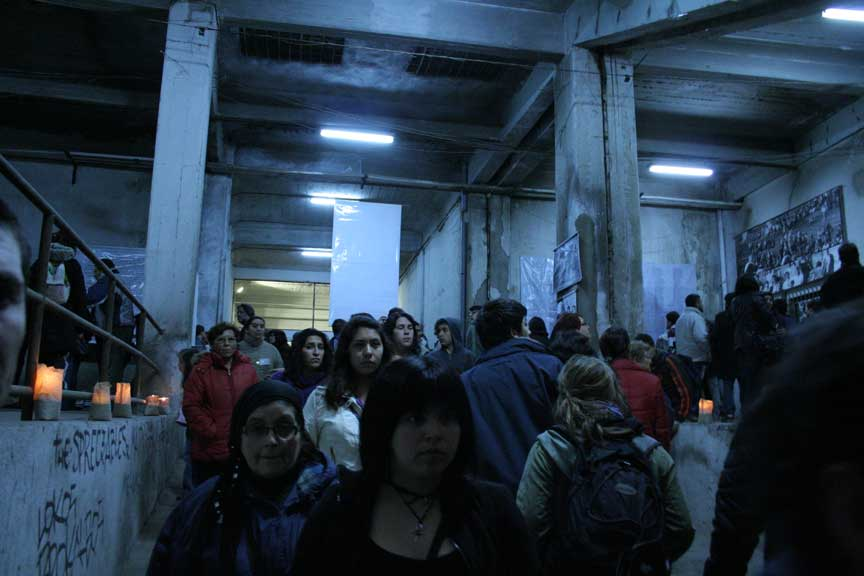 Interior de la Escotilla Nº8. Estadio Nacional. Chile.